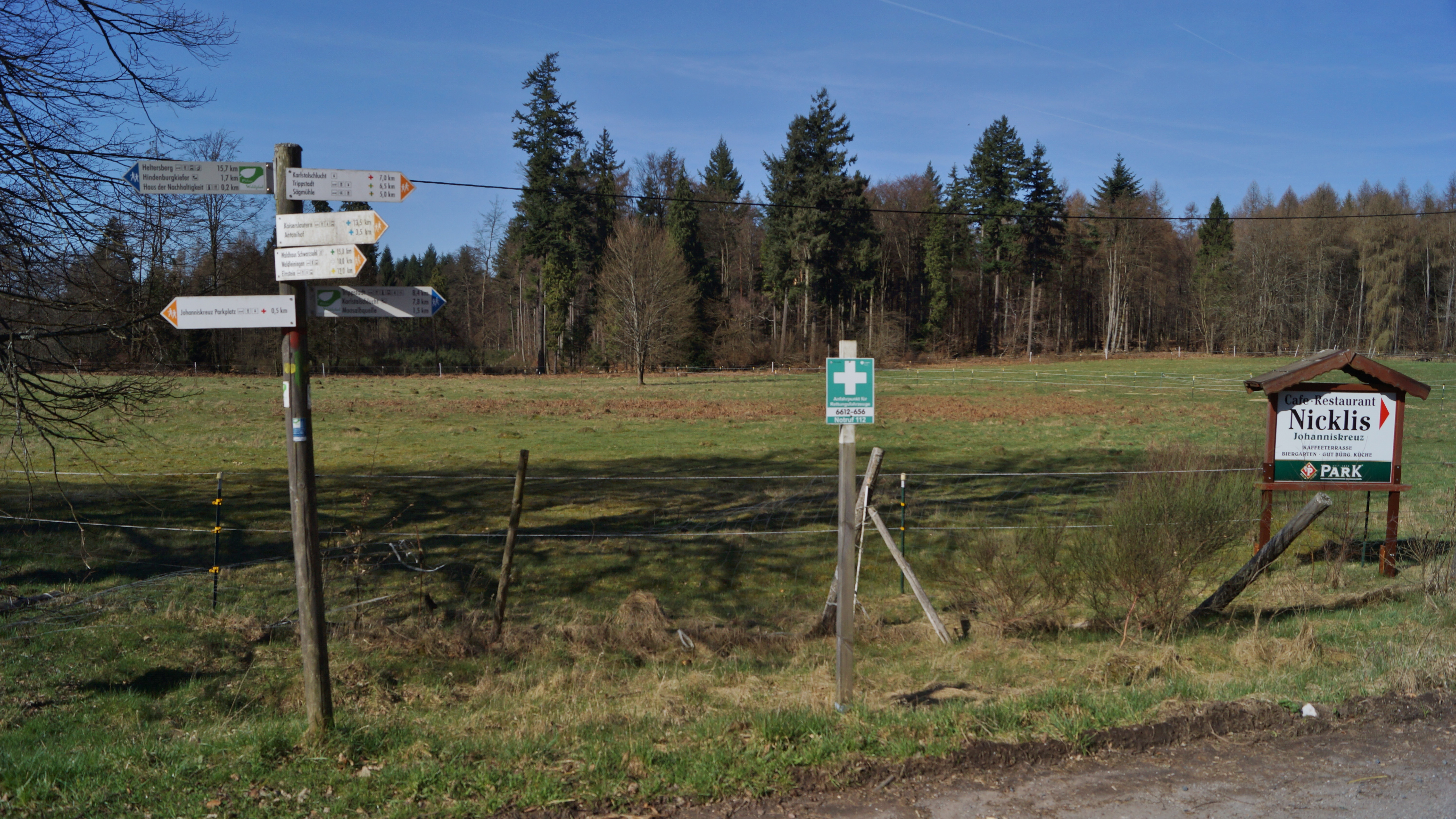 Germany, Rheinland-Pfalz - Pfälzerwald 463 m ü. NHN